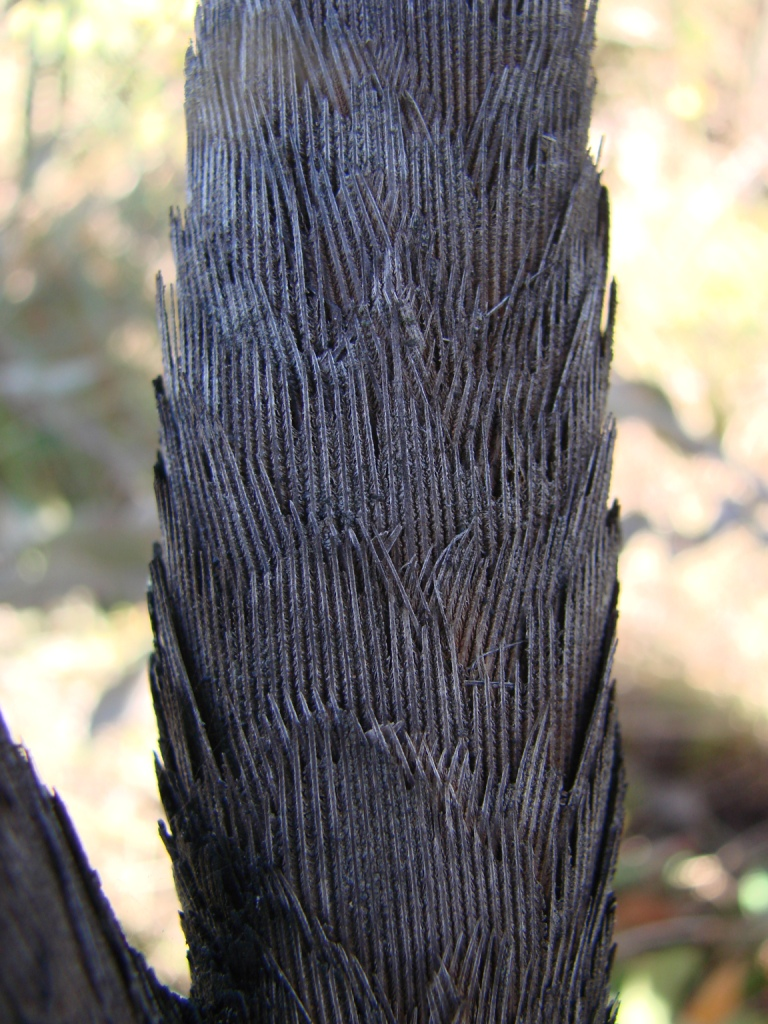 Vellozia flavicans (=Vellozia squamata), Velloziaceae - Brasilien/Brasil: Distrito Federal, Jardim Botanico de Brasília